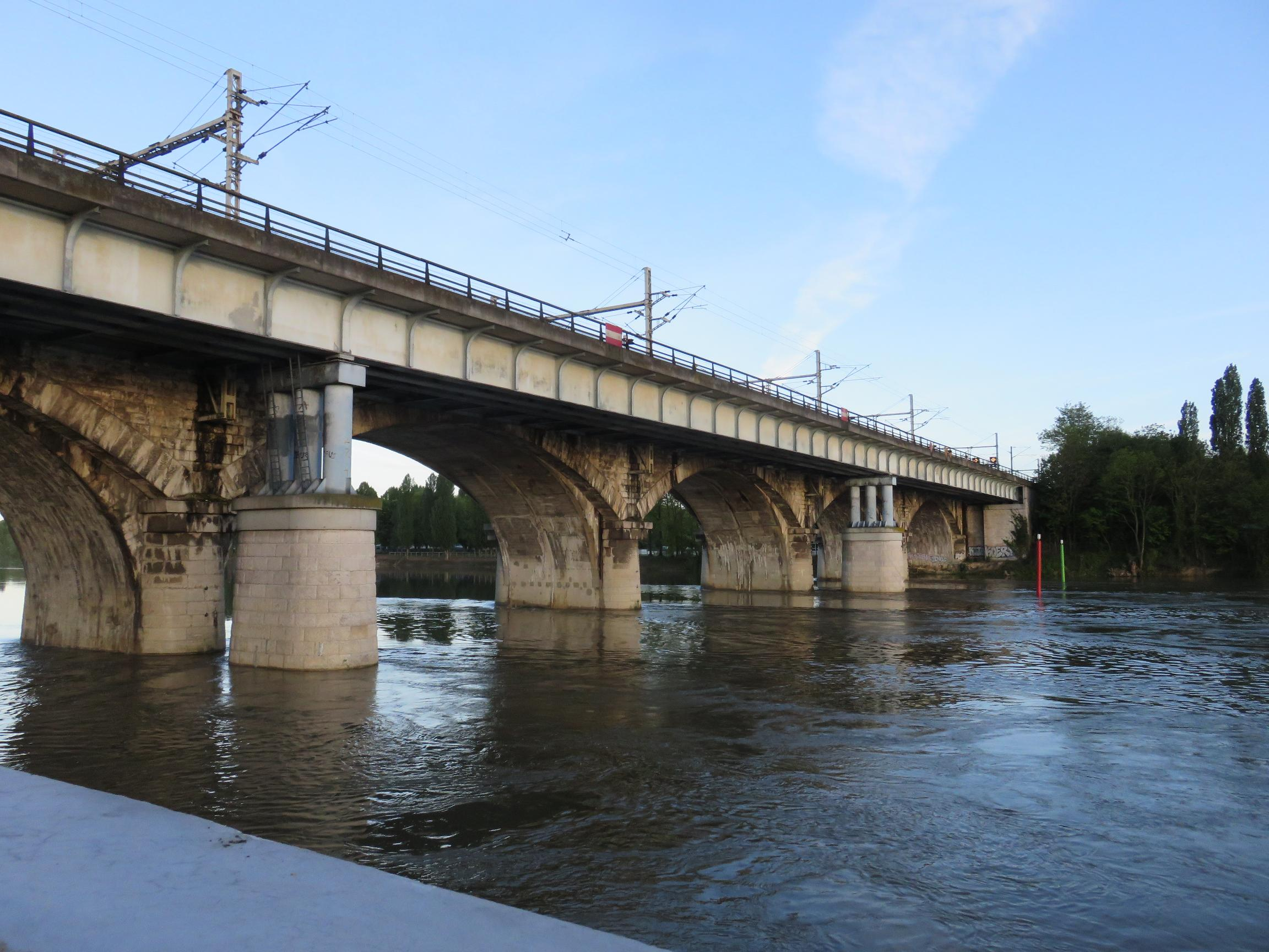 Pont SNCF de Maisons-Laffite partie Sud